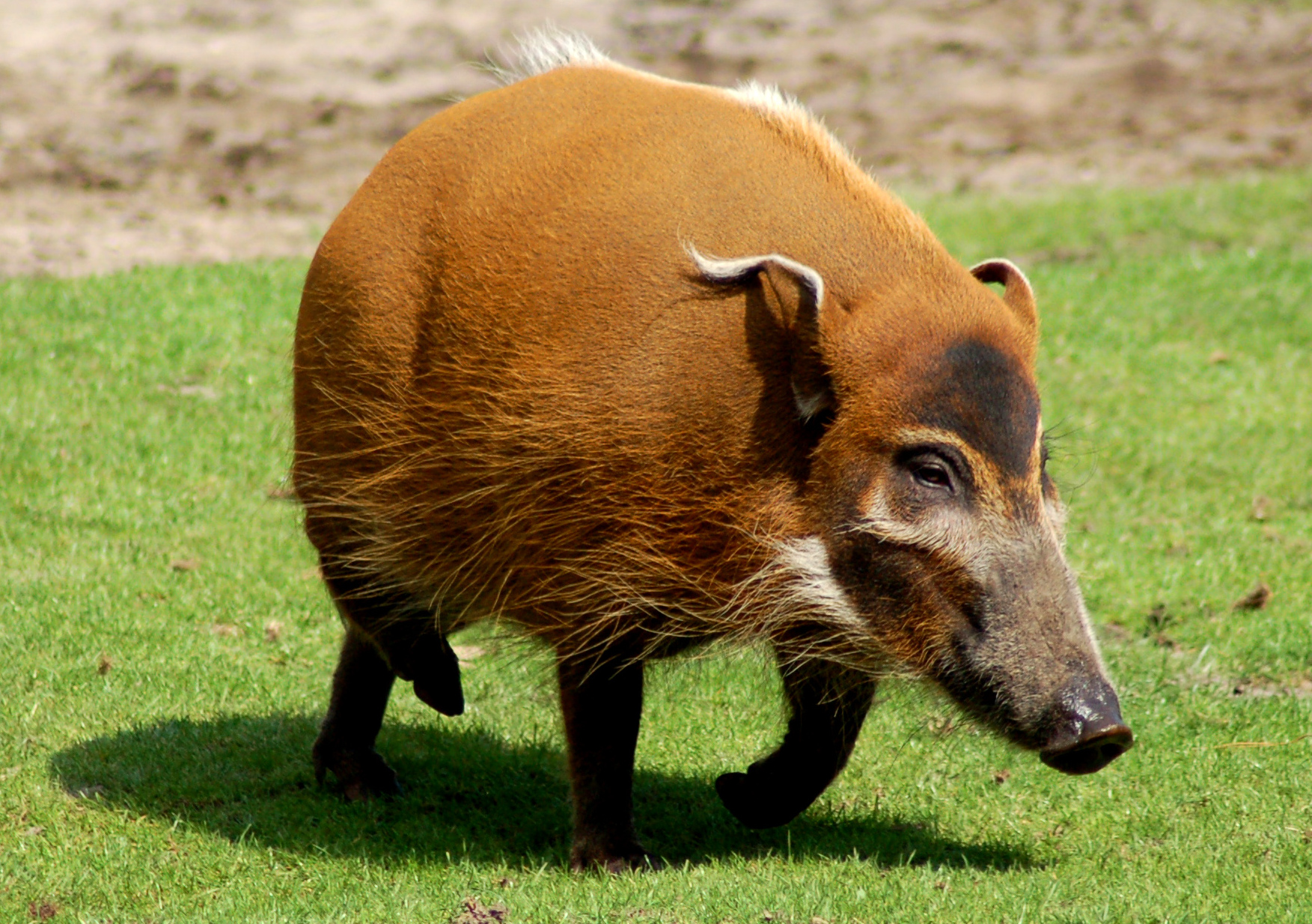 Diné bizaad: Tábąąh bisóodiłchíiʼii